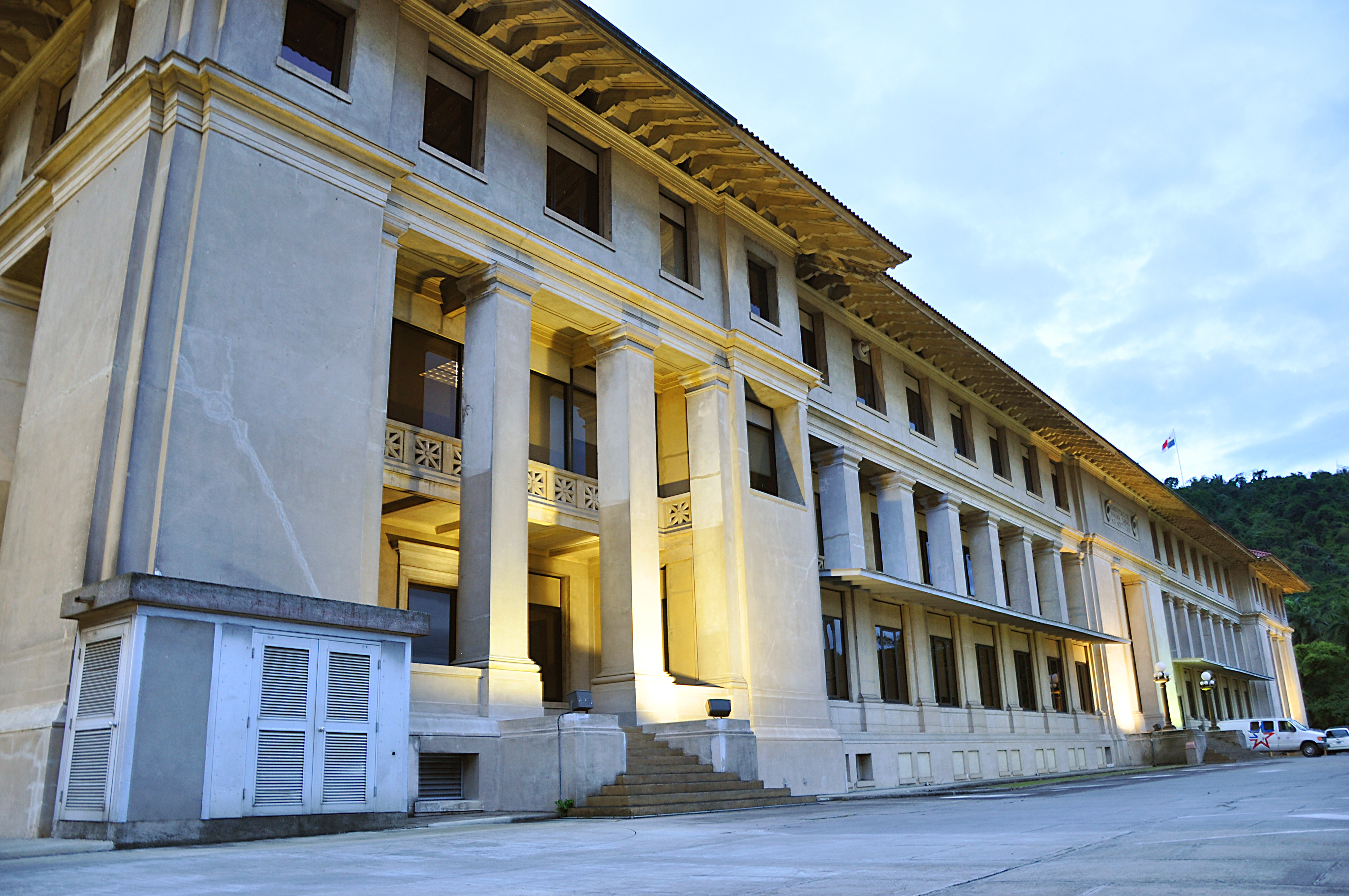 Fachada frontal del Edificio de la Administración del Canal de Panamá